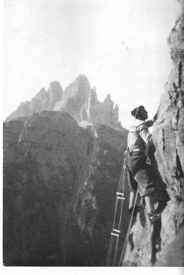 Arrampicate vicino casa negli anni Cinquanta.